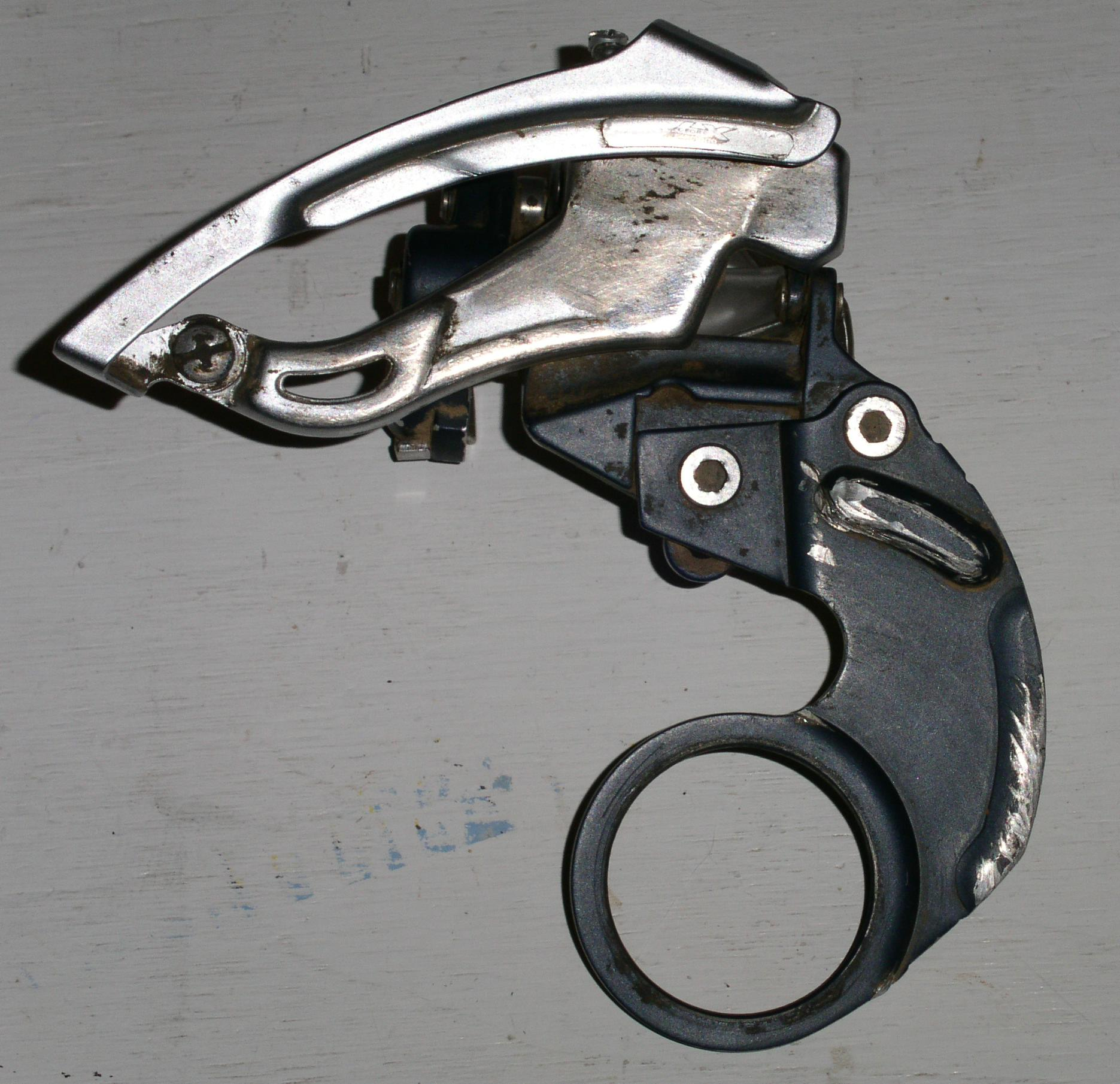 shimano LX front derailleur e-type bicycle